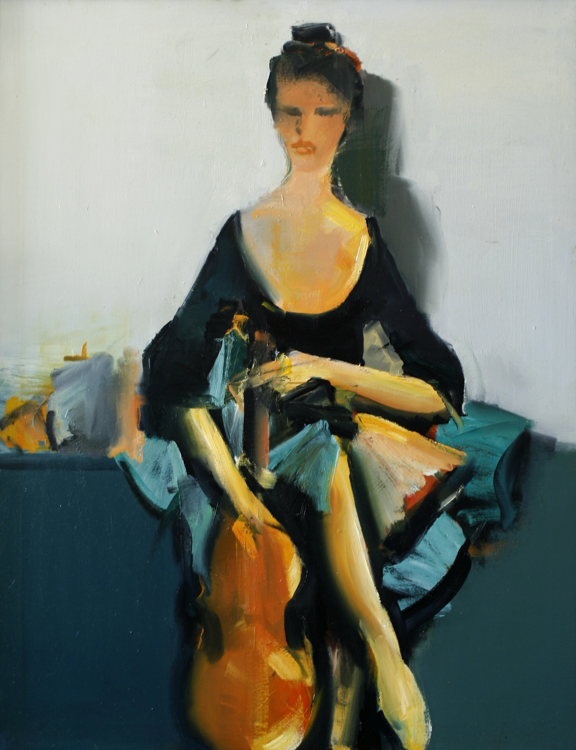 Corneliu Ionescu - Feminitate